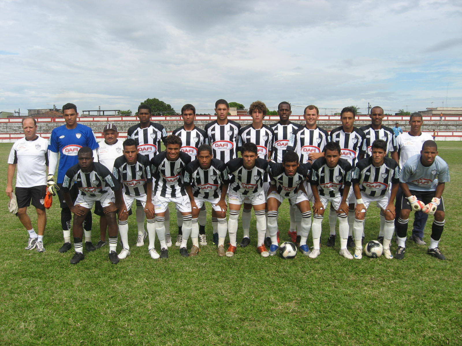 Equipe profissional do Rio das Ostras FC, promovida à Série B do Campeonato Estadual do Rio de Janeiro.